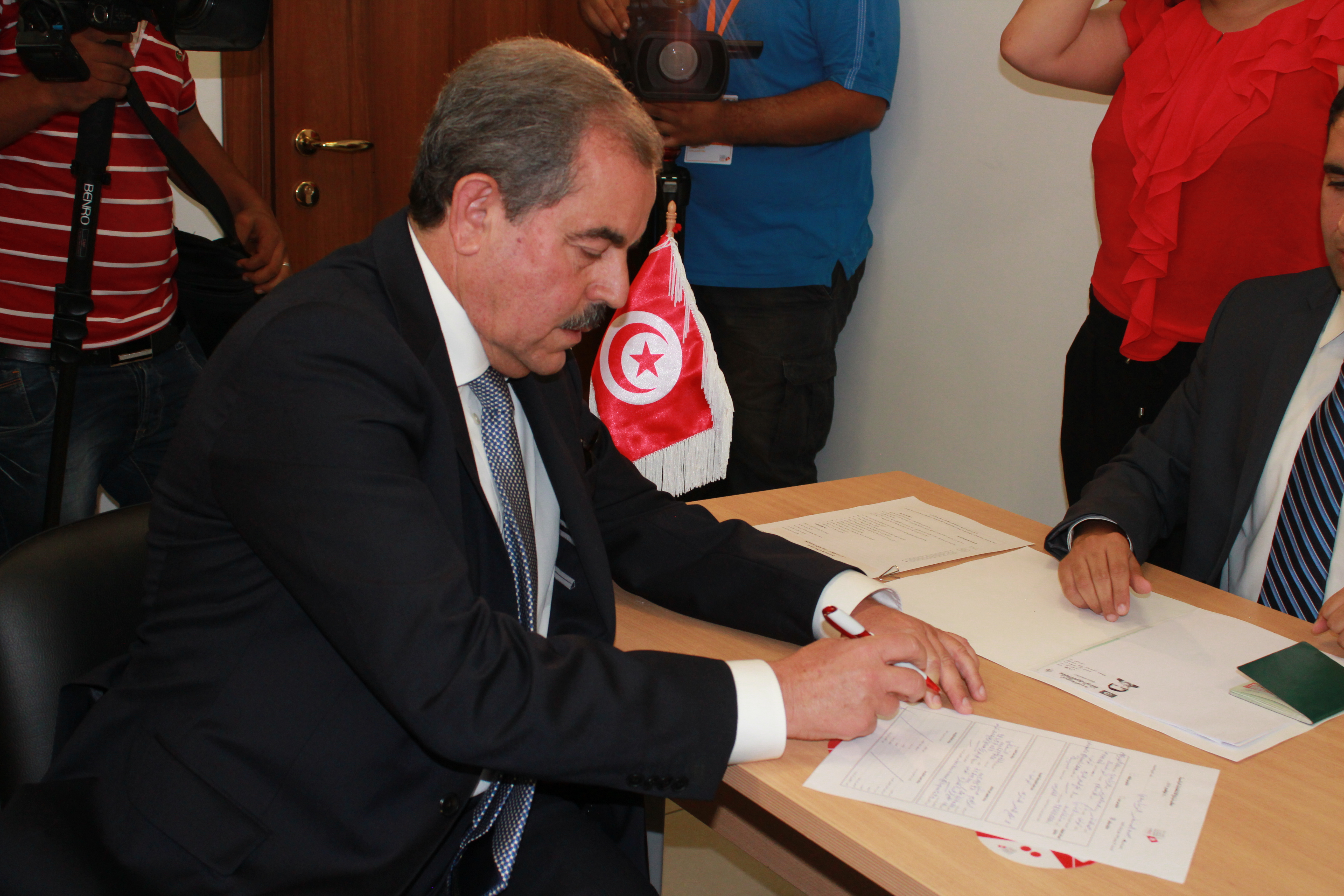 Signature du dépôt de candidature de Mondher Zenaidi à l'ISIE pour les présidentielles de 2014